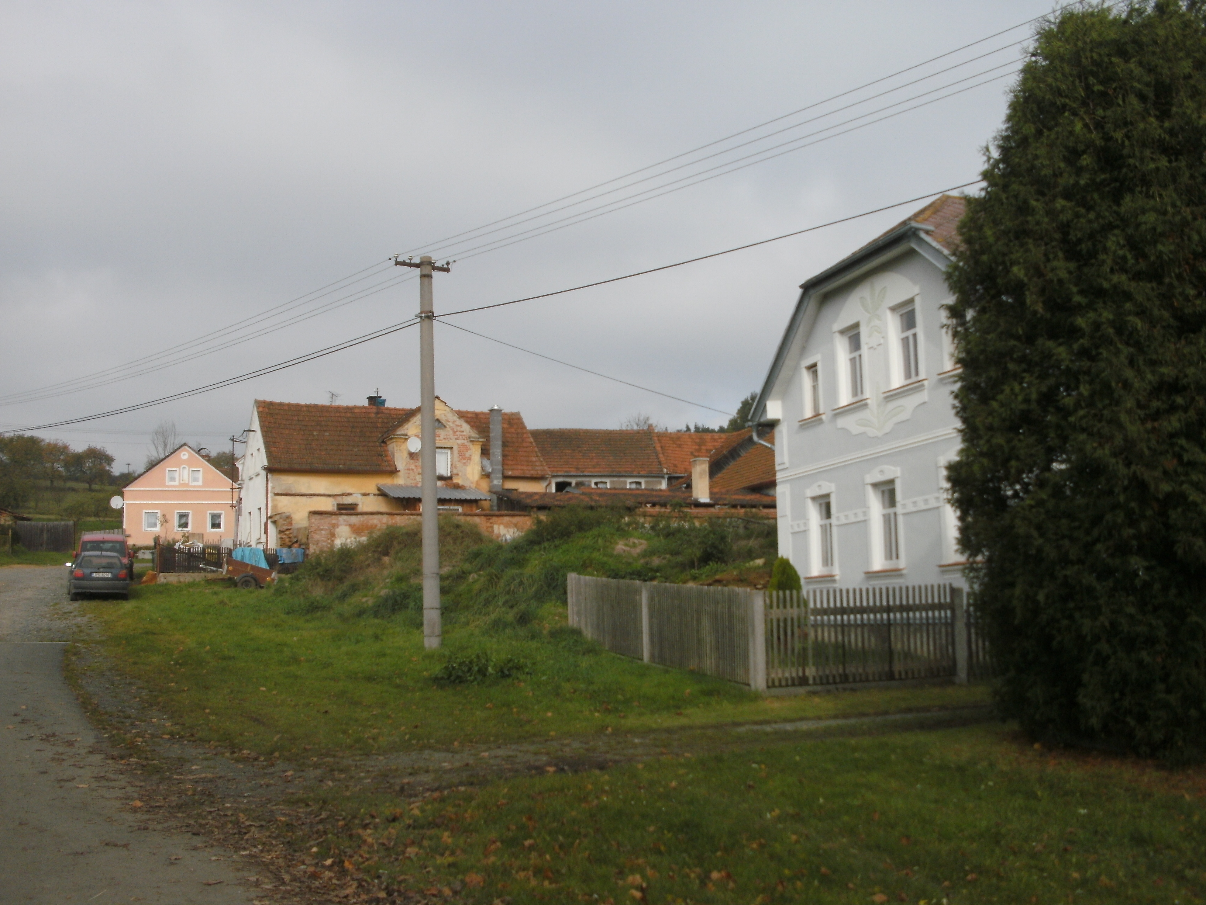 Tasnovice